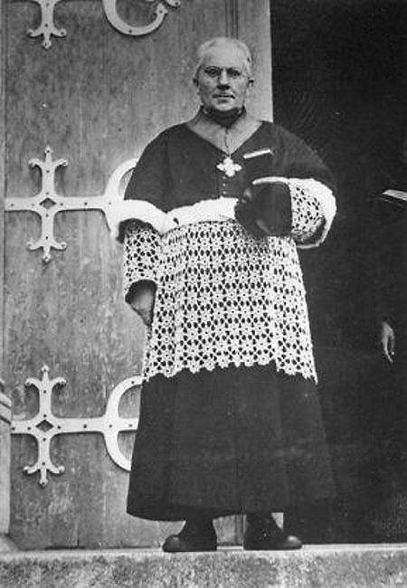 Le prêtre François-Constant Uzureau, aumonier de la prison d'Angers